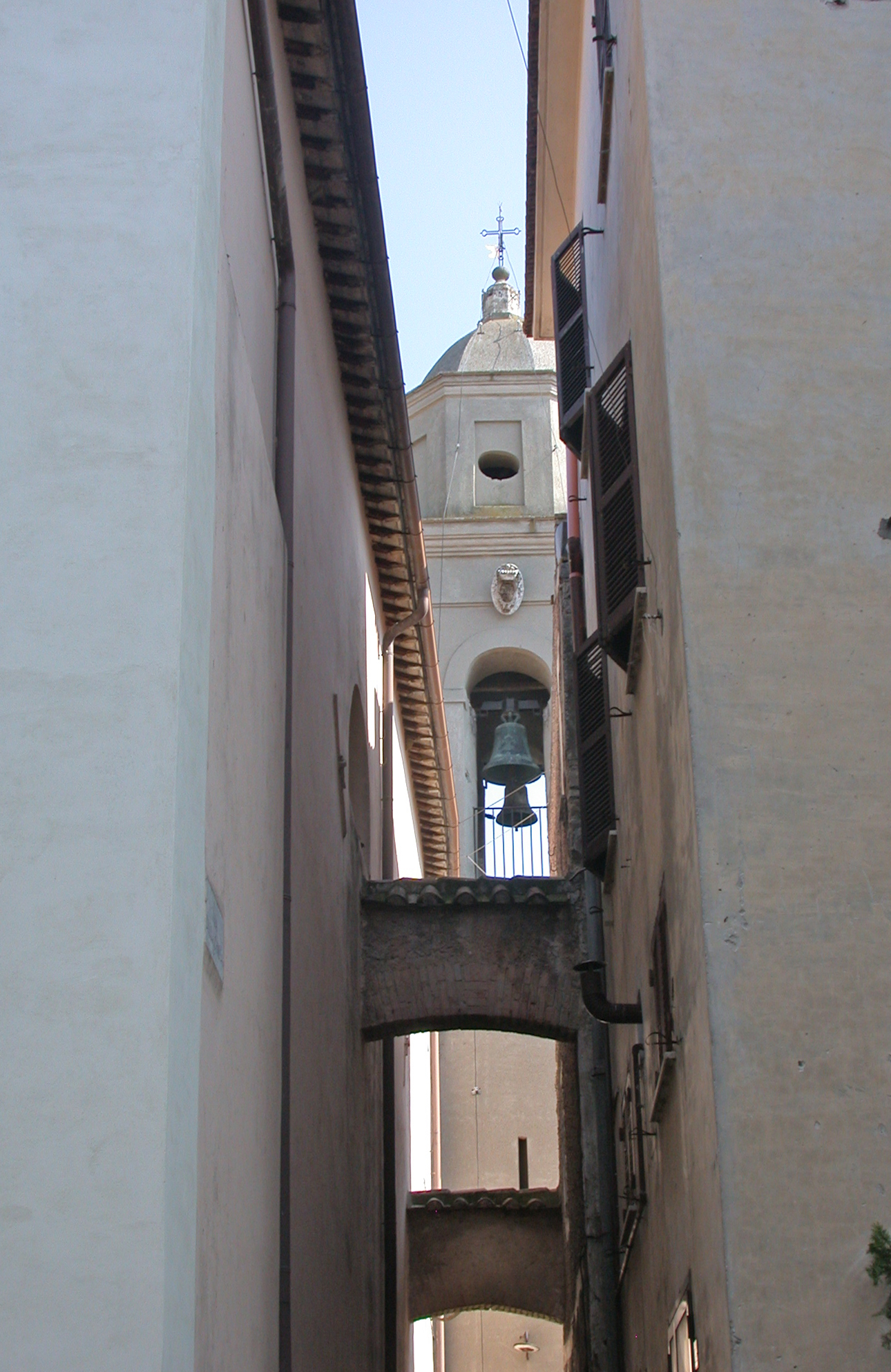 Italia, Lazio, provincia di Roma, Montelibretti, chiesa di San Nicola di Bari, campanile